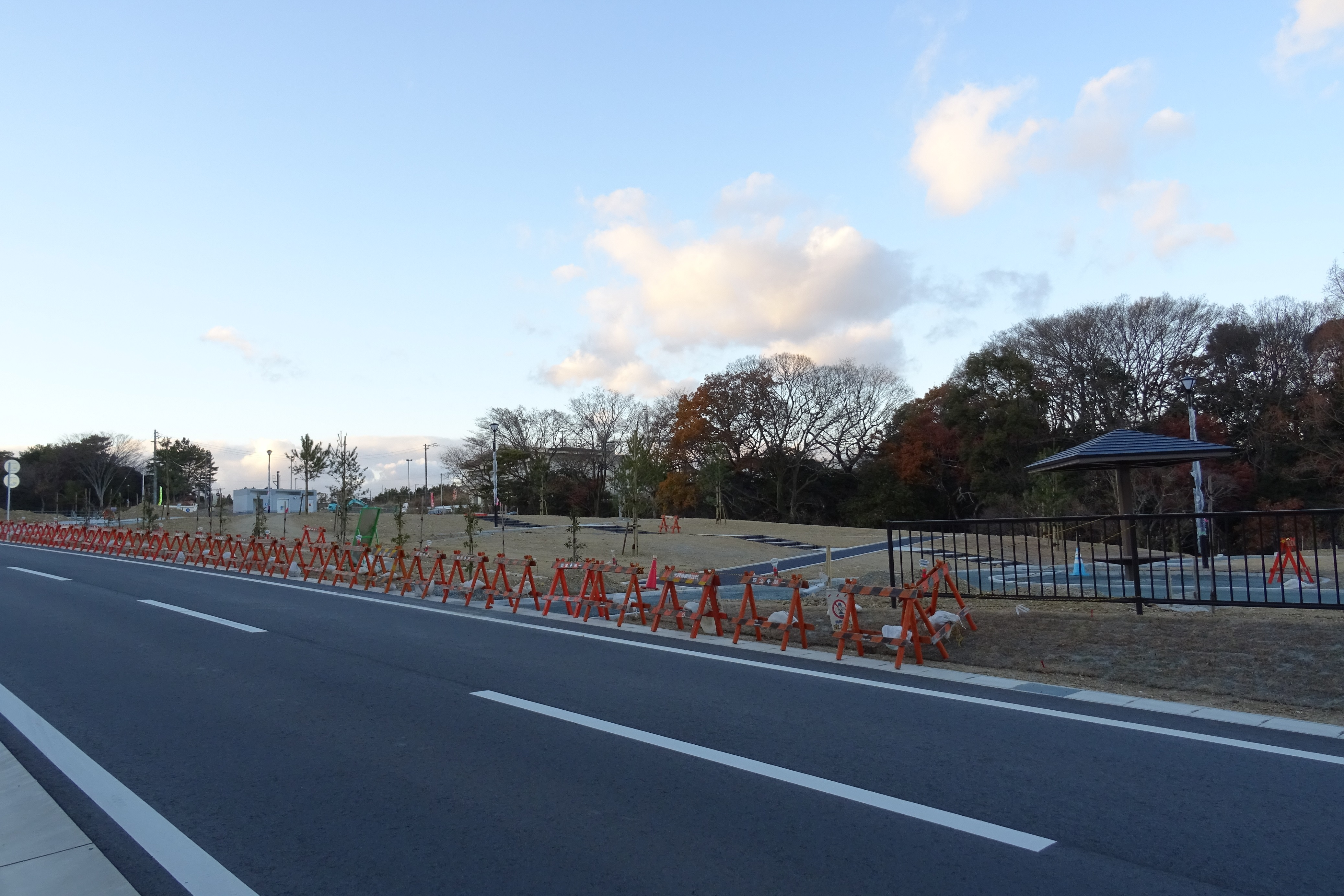 三方原公園